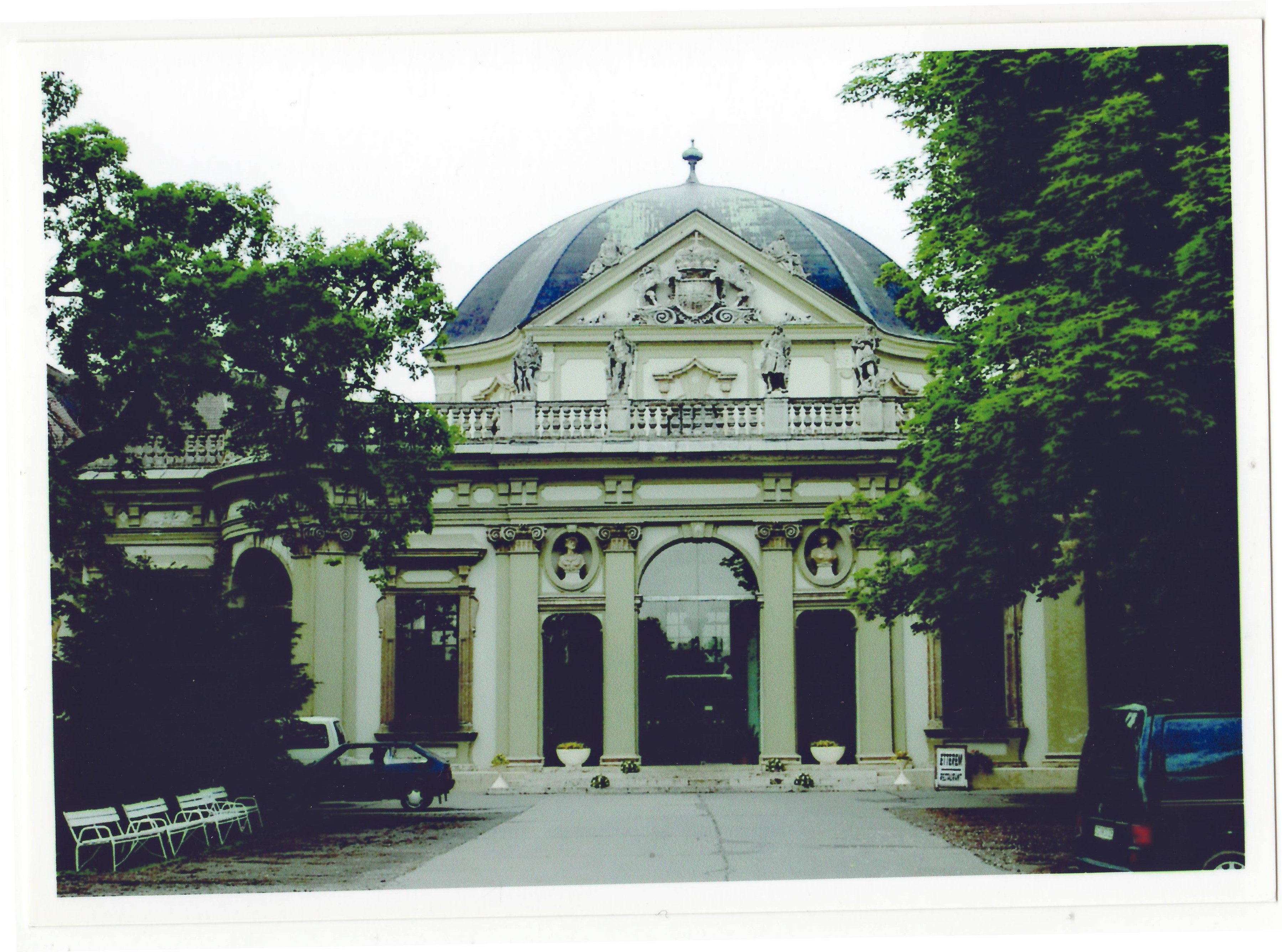 Ráckevei kastély